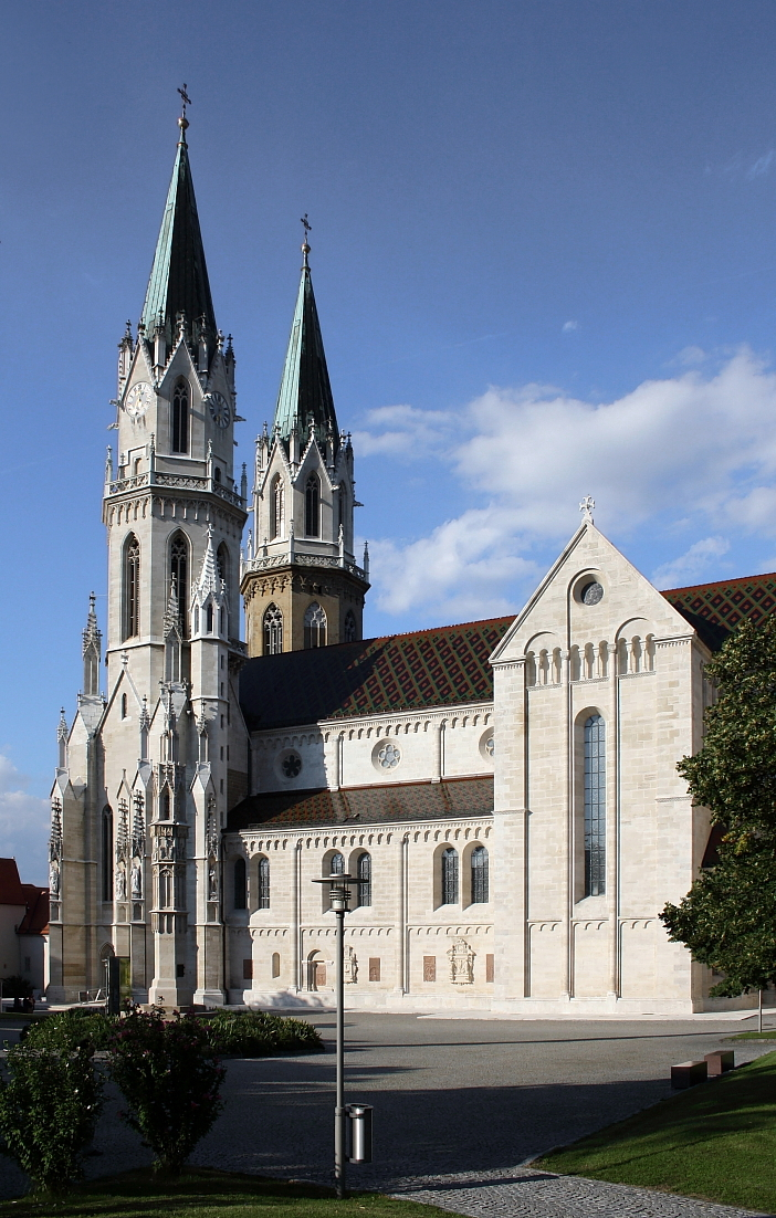 Südansicht der Stiftskirche Klosterneuburg in Niederösterreich.